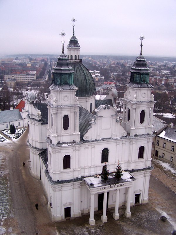 Basilica in Chełm